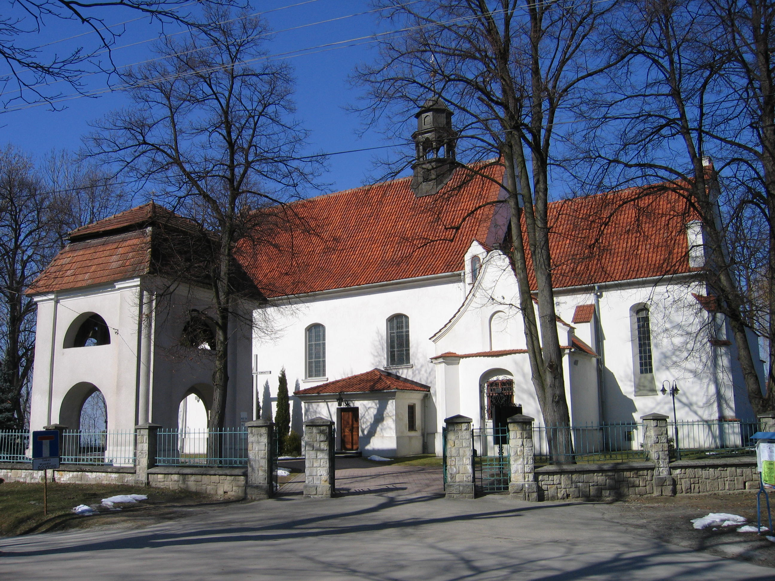 Zbylitowska Góra - kościół pw. Podwyższenia Krzyża Świętego, widok od południa (zabytek nr A-421)